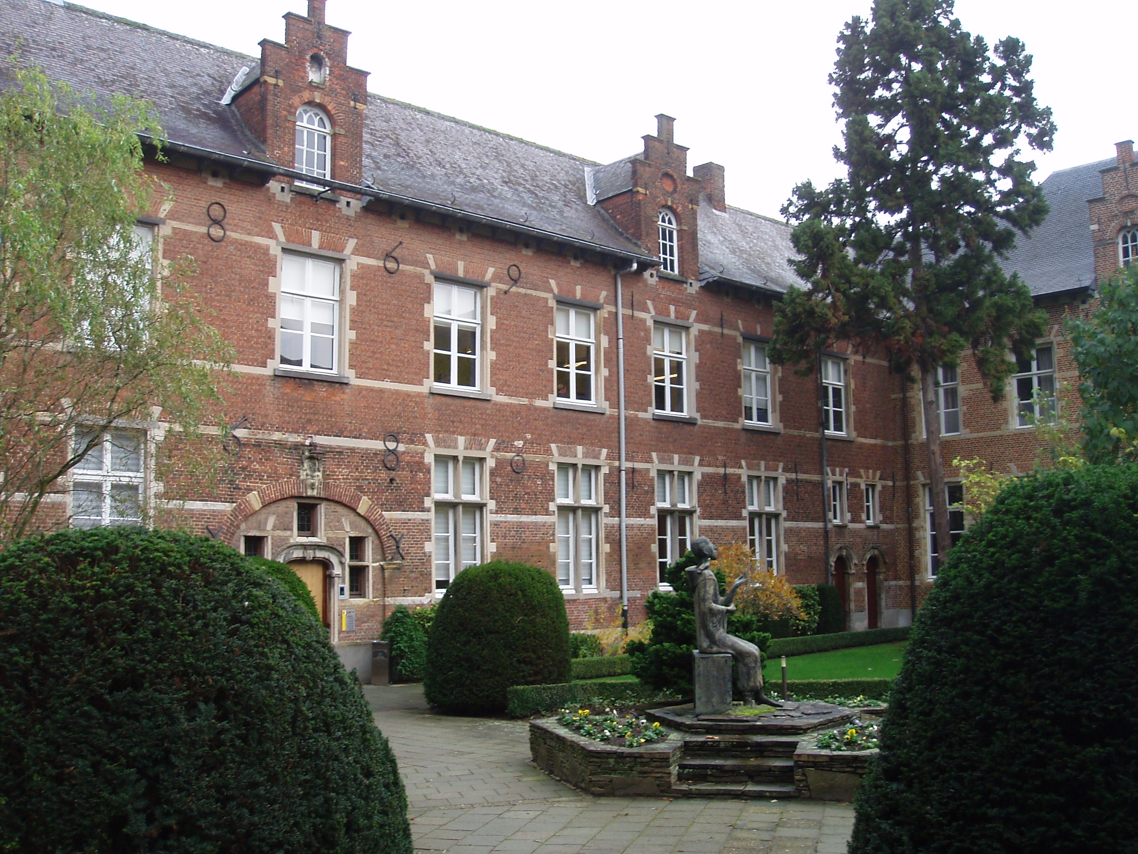 Besloten hof Herentals